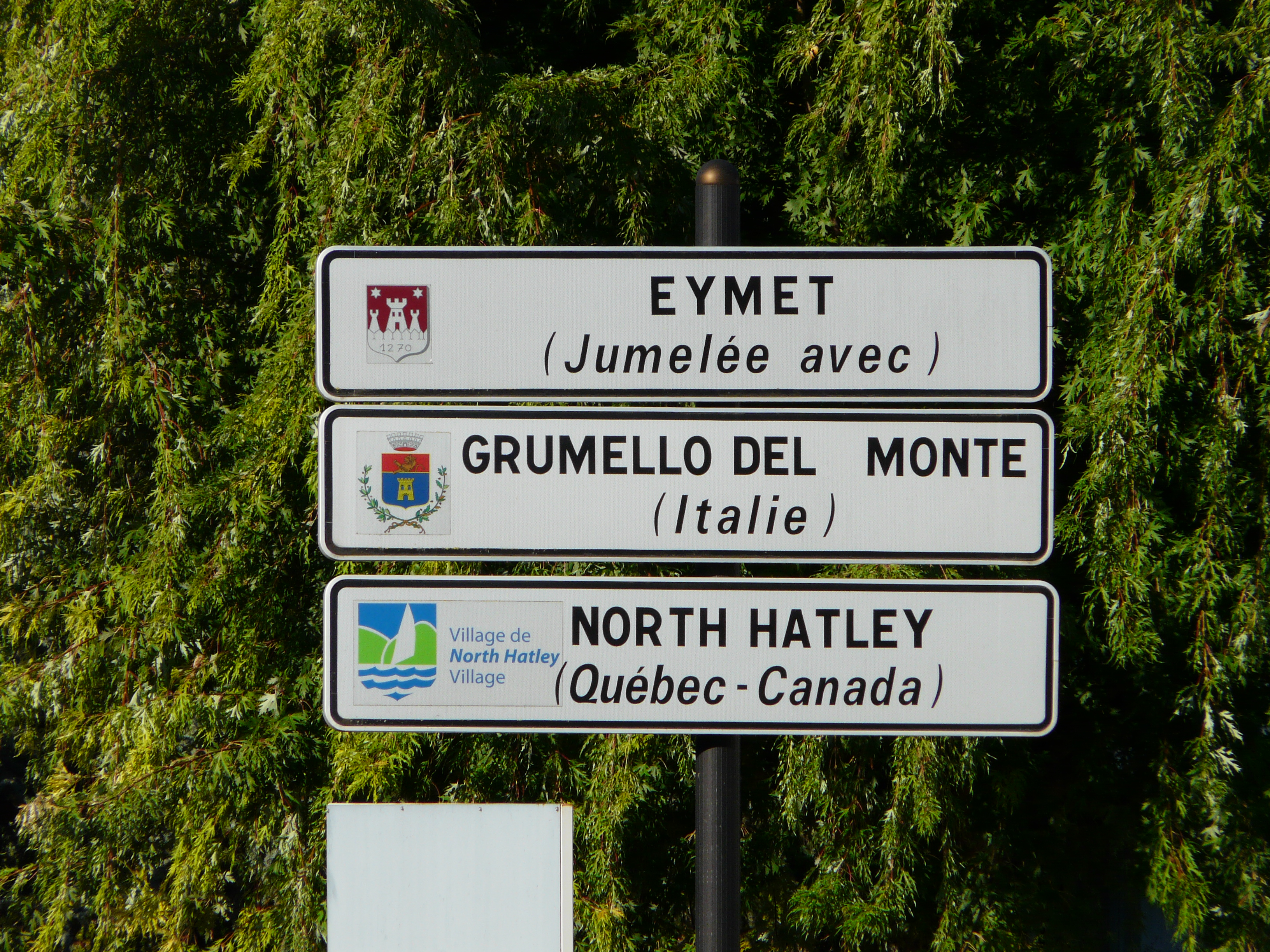 Panneaux de jumelage à Eymet, Dordogne, France.